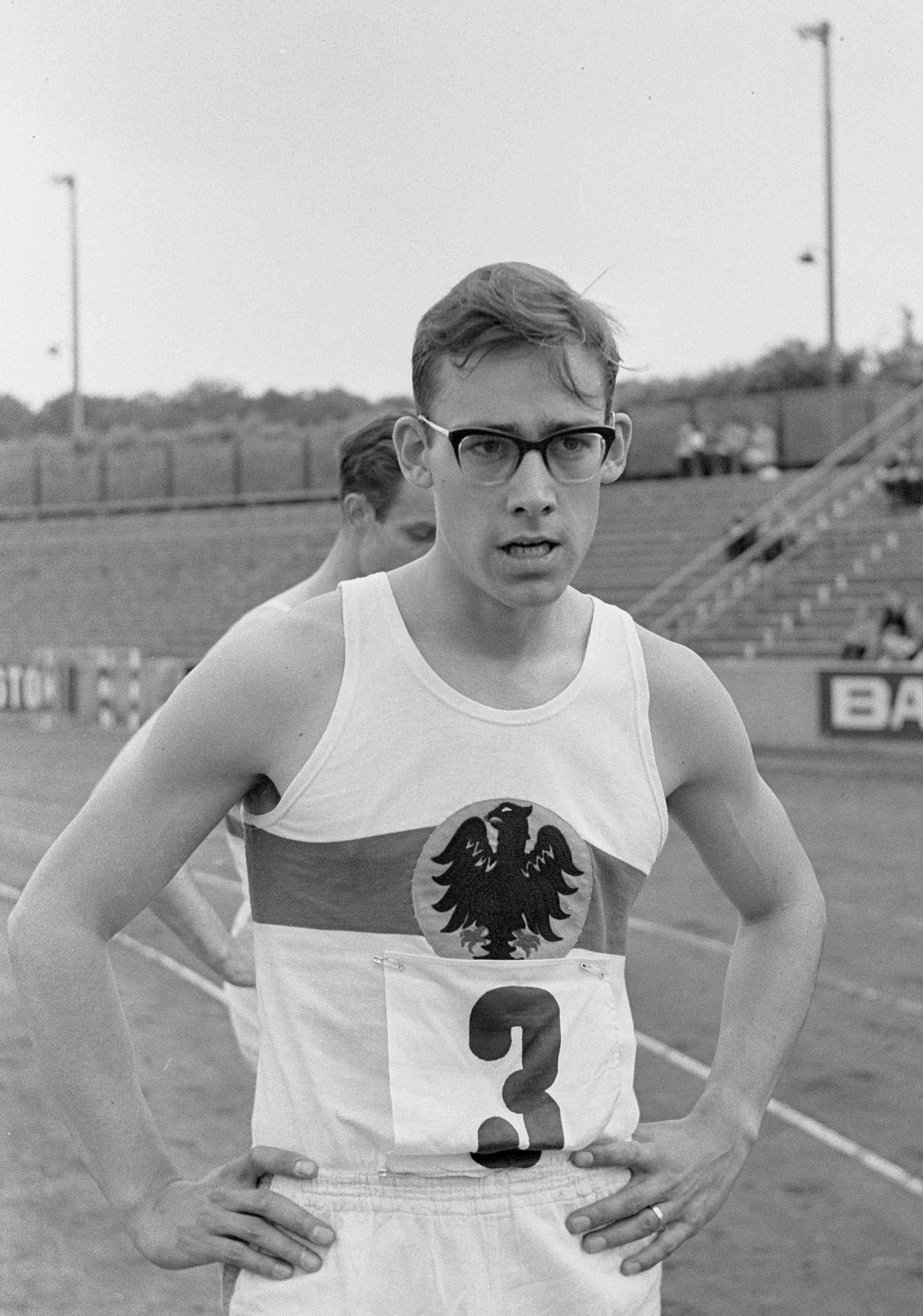 Zes Landen Atletiek in Enschede. 400 meter loper Reske (Duitsland)